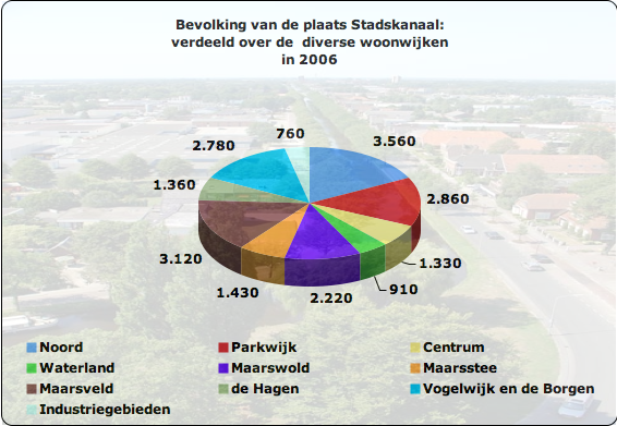 bevolking van de plaats Stadskanaal in 2006 verdeeld over de diverse woonwijken - gebaseerd op gegevens van het CBS